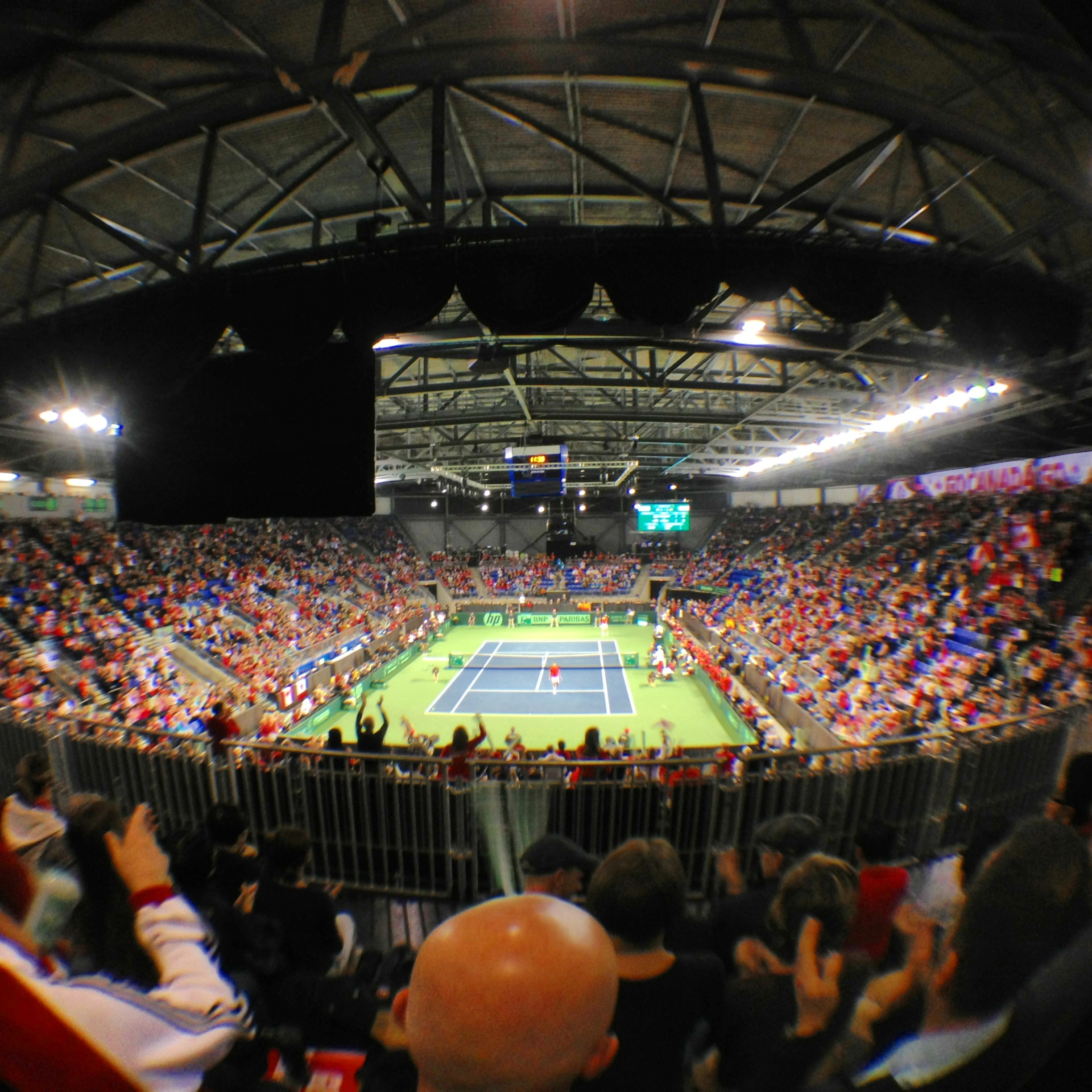 Vancouver